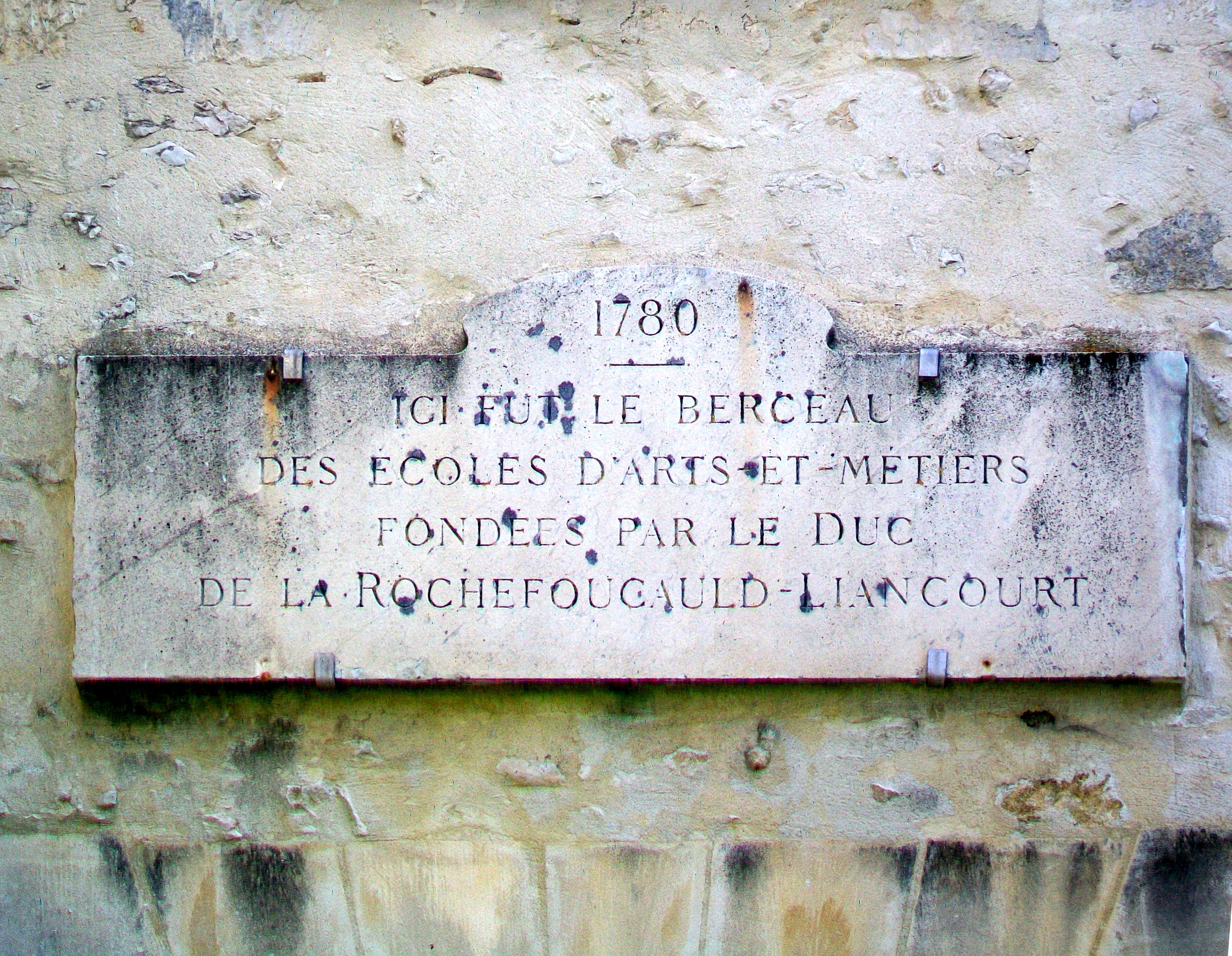 Plaque commémorative au-dessus de l'entrée du musée.